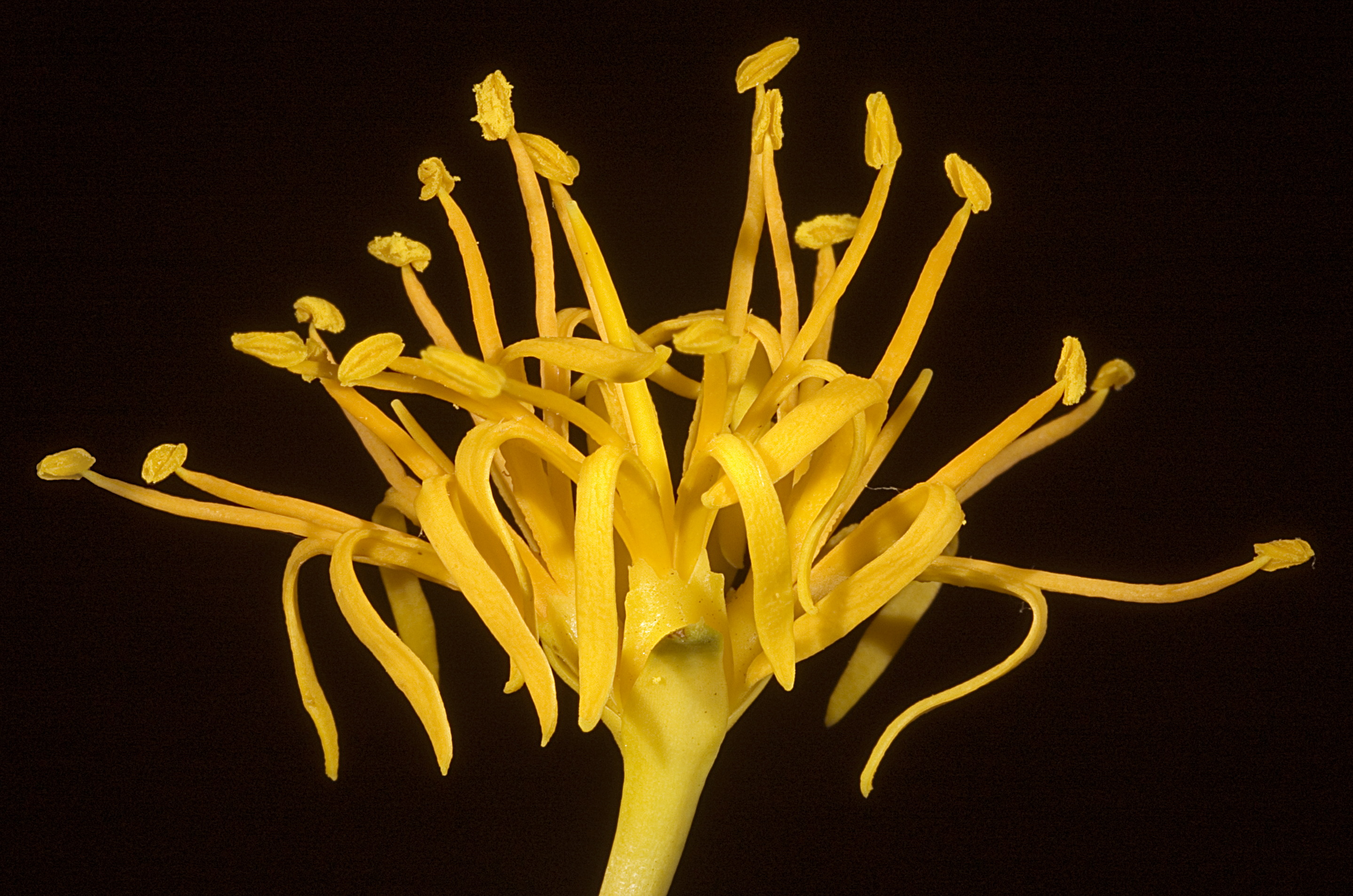 KRT3117